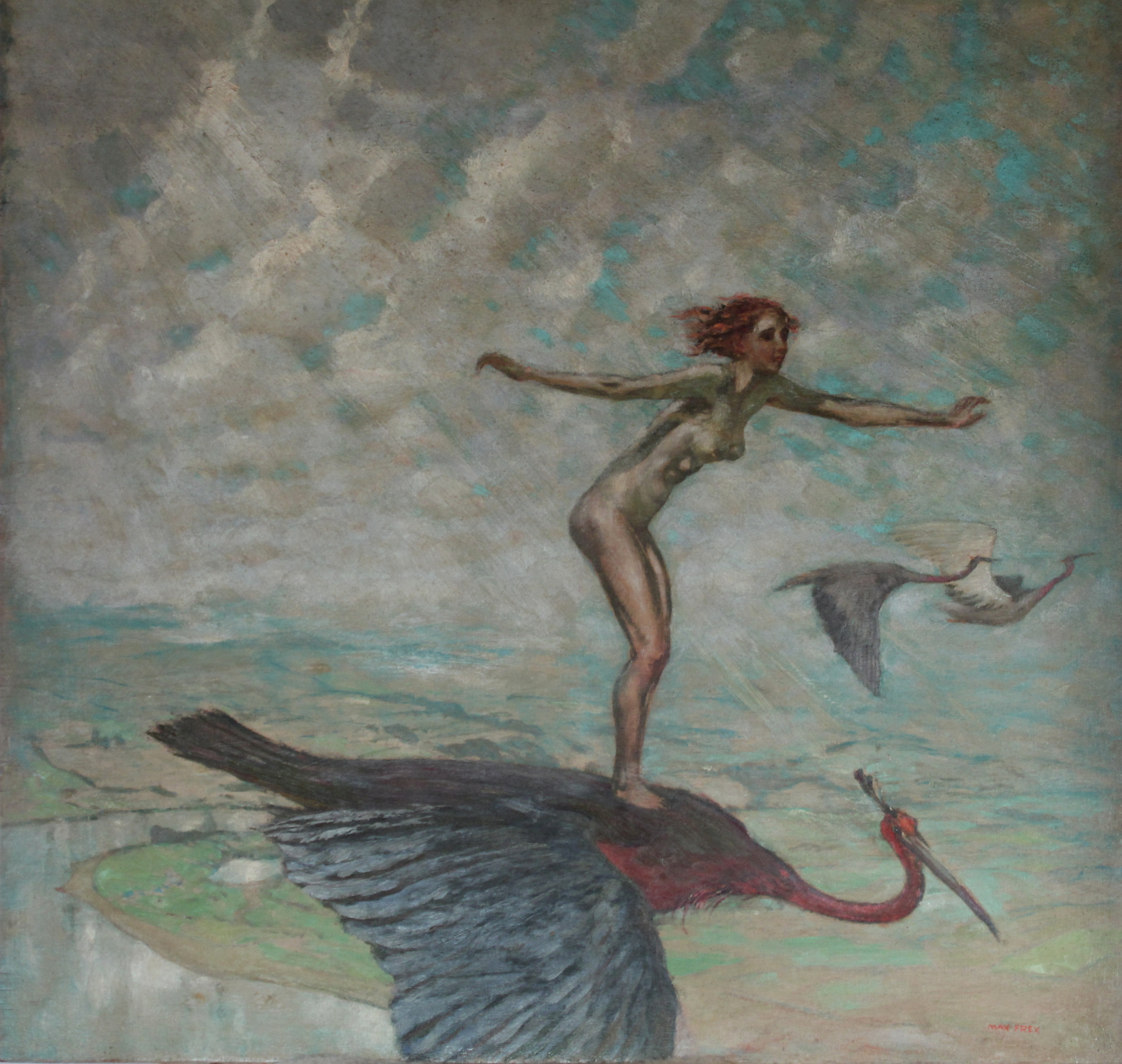 Max Frey (1874-1944): Wandervögel, 1931. Öl auf Hartfaser. 70 x 70 cm